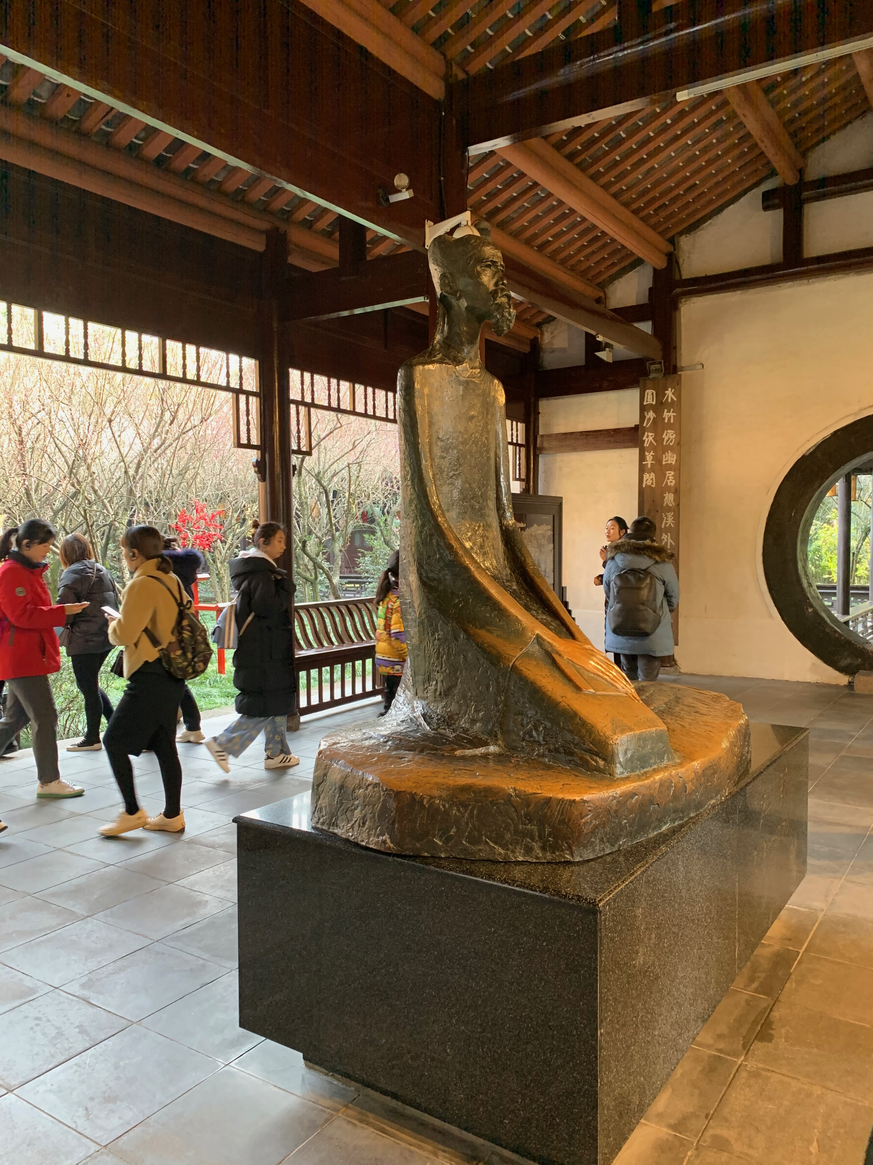 Brązowa rzeźba Du Fu w Holu Domu Du Fu w Chengdu